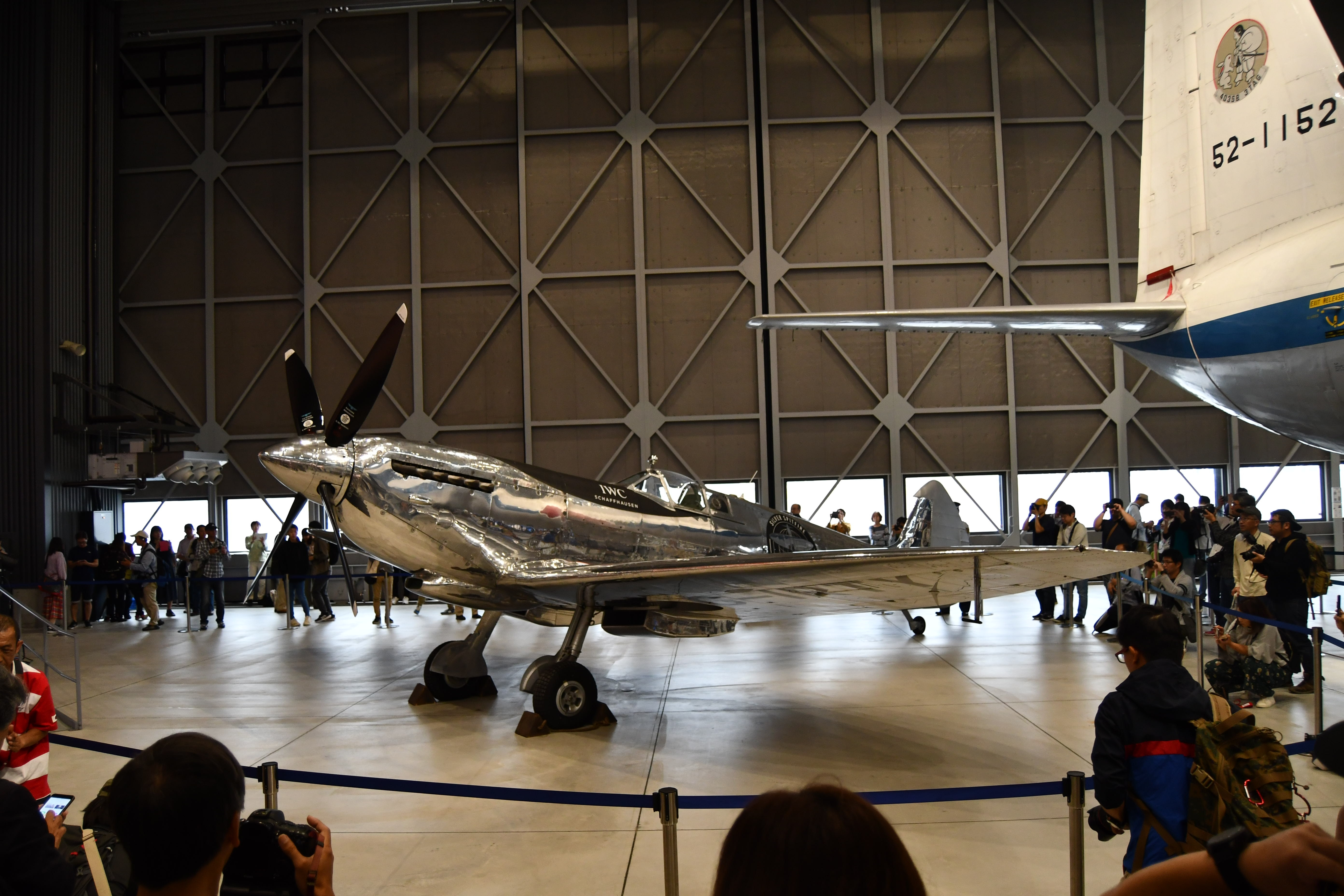 あいち航空ミュージアムで展示されたシルバースピットファイア